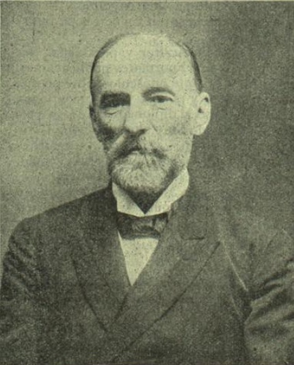 Alejandro San Martín, ministro de Instrucción Pública.